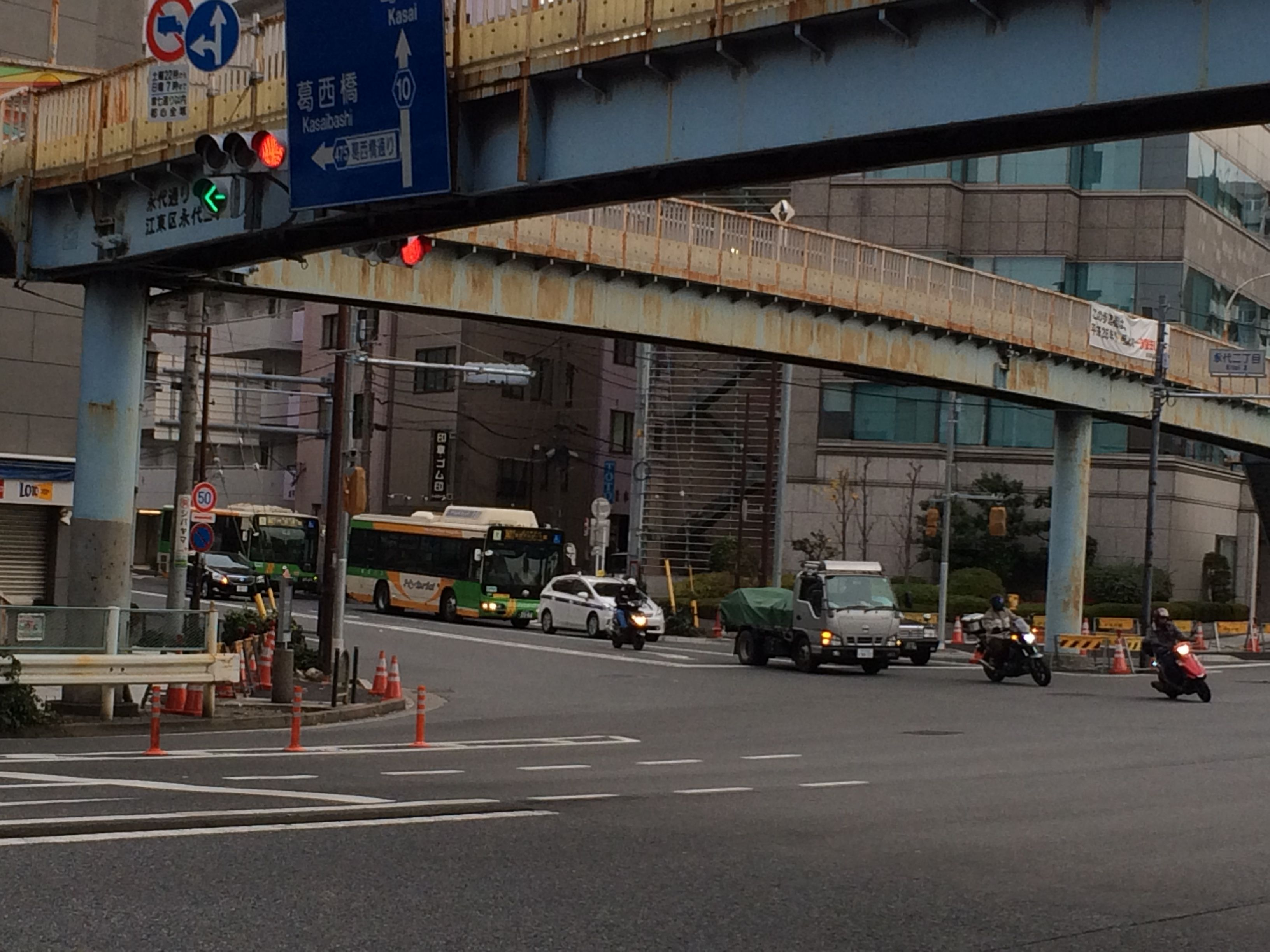 葛西橋通りが永代通りから別れる永代二丁目交差点を撮影